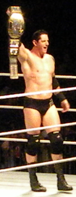 Barrett como Campeón IC